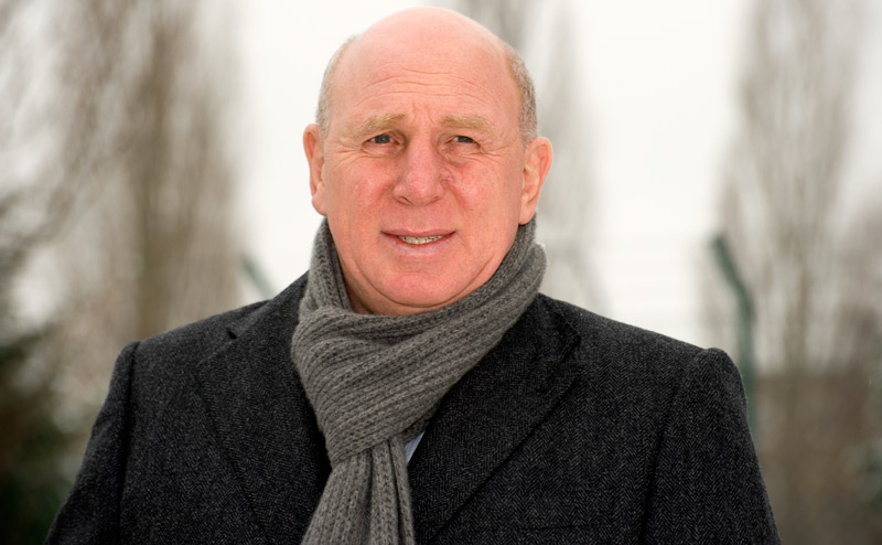 Dieter Hoeneß vor der Hertha BSC Geschäftsstelle